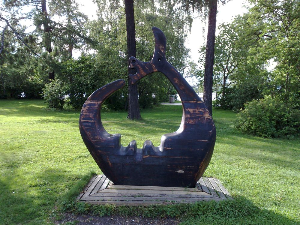 Storsjöodjuret